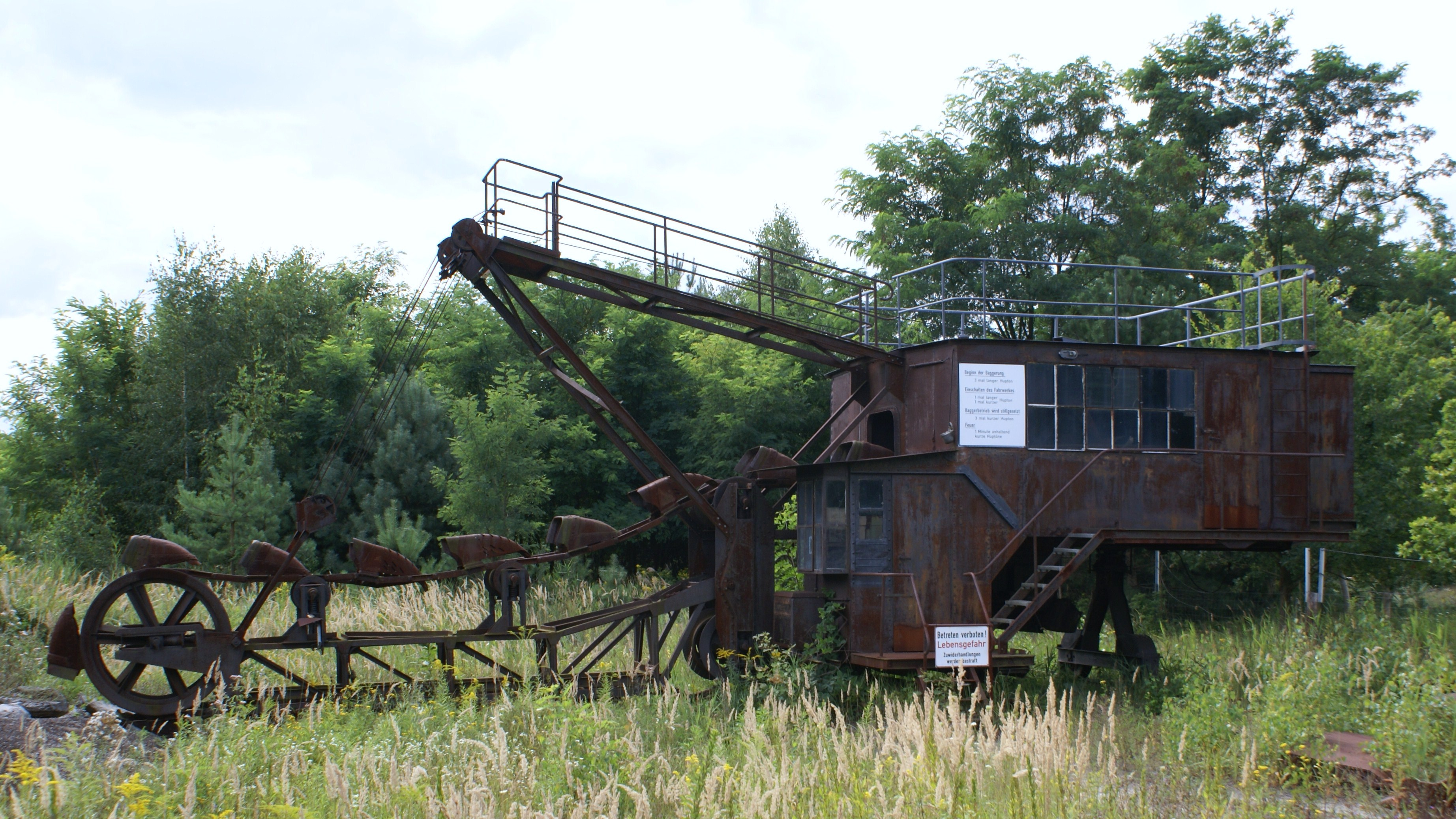 Eimerkettenbagger im technischen Museum "Energiefabrik Knappenrode" in Hoyerswerda-Knappenrode